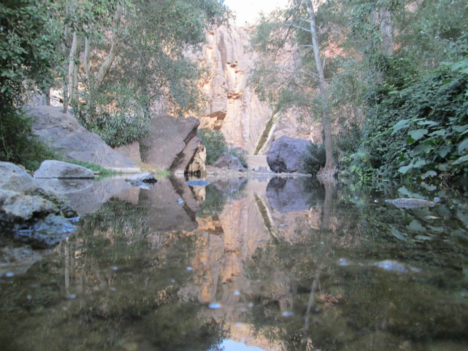 منظر عام لقرية إسلان